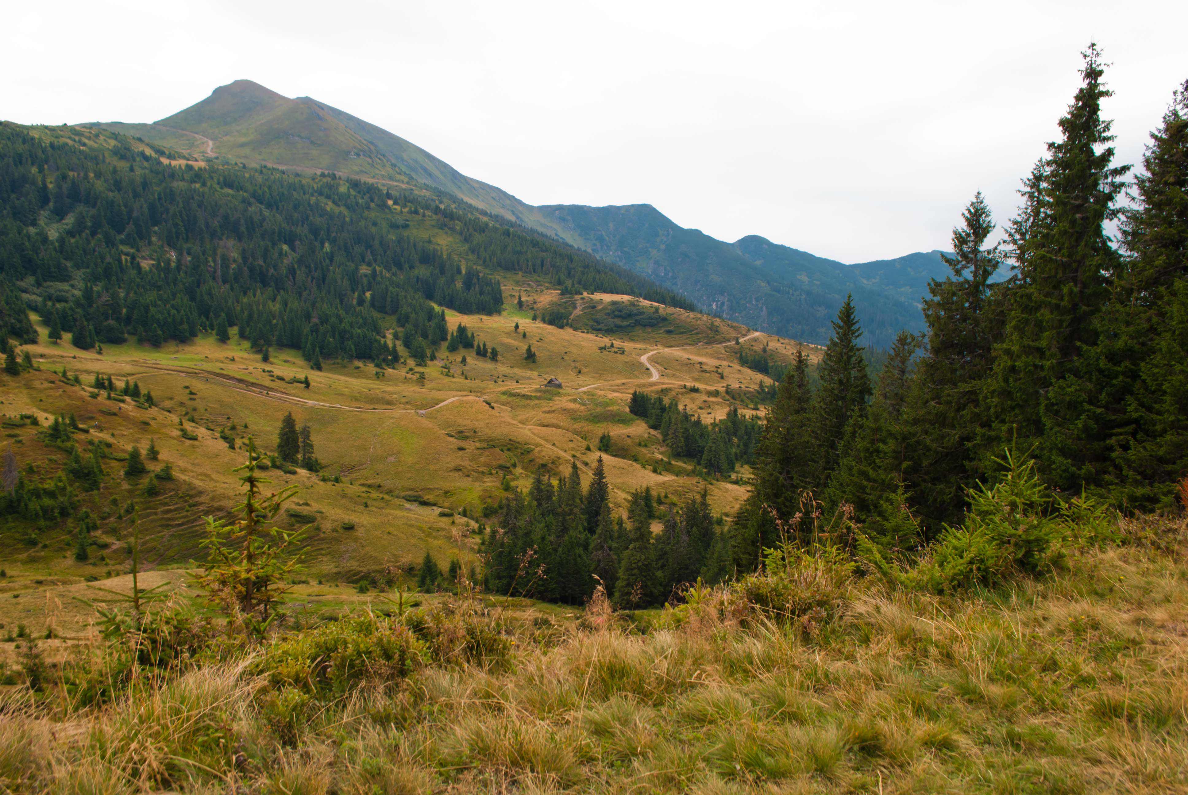 Піп Іван Мармароський, вид з сідловини